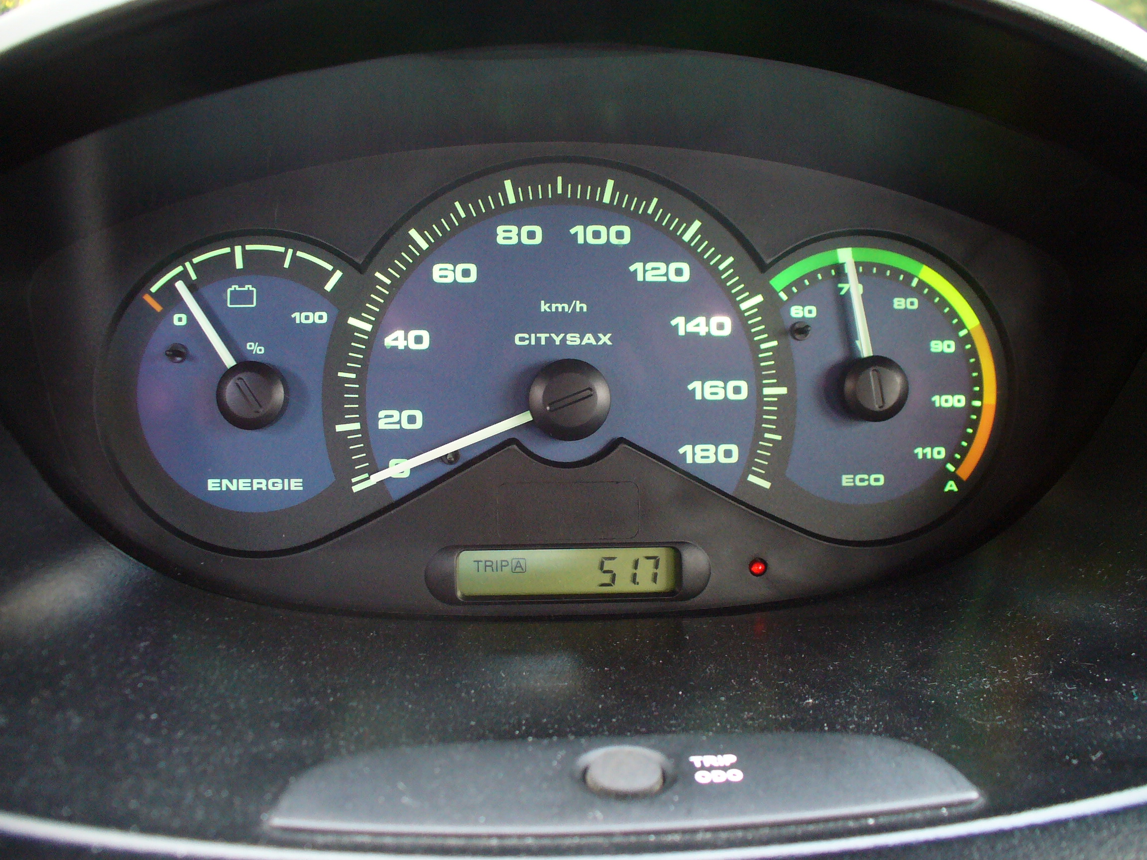 Elektroauto CitySax, Zeigerinstrumente beim Laden: links der Ladezustand der Traktionsbatterie, rechts eine Amperemeter-Stromanzeige für den Fahr- bzw. hier den Ladestrom